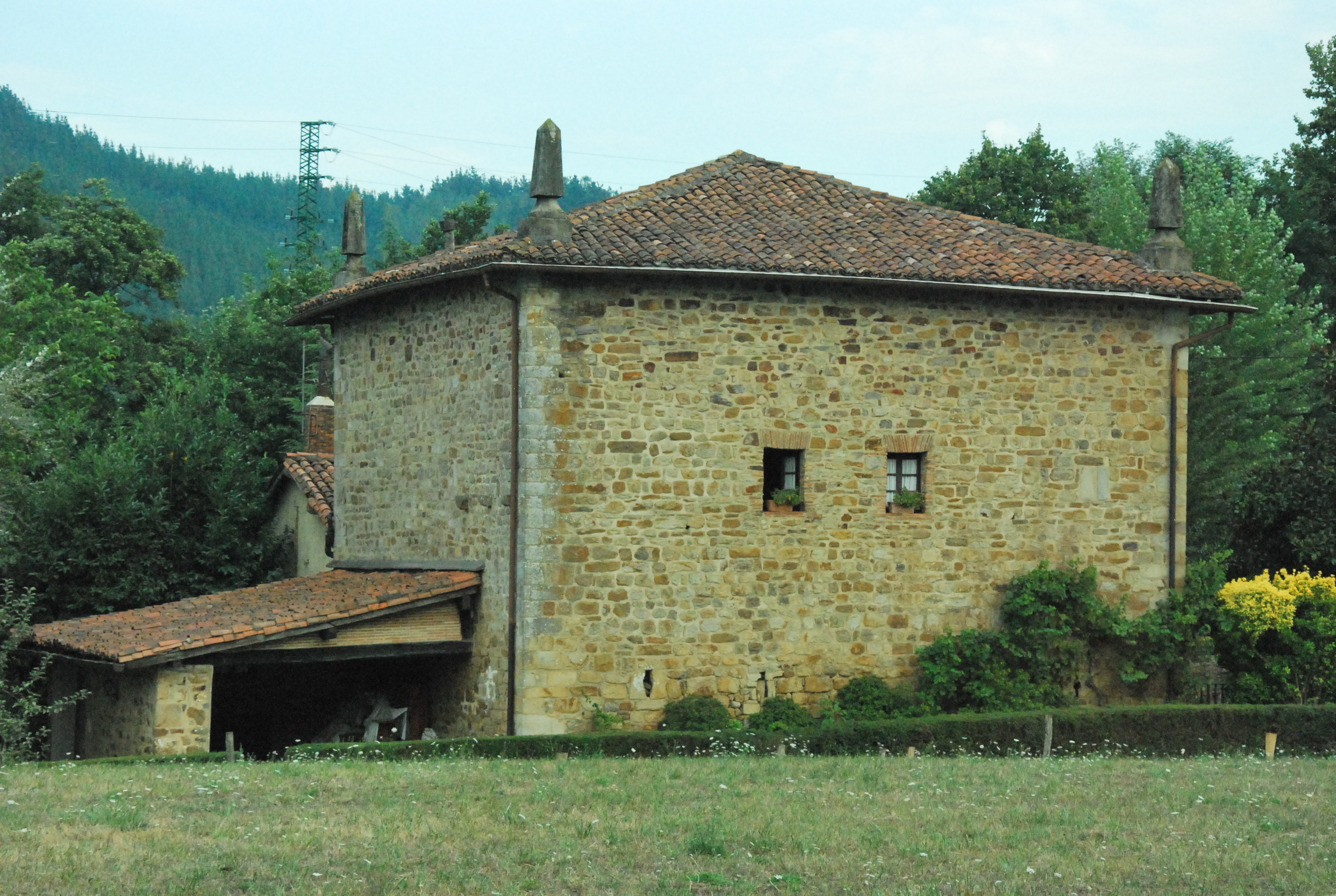 Oñatiko San Pedro auzoko Garibai torria, Torreauzo bezala ere ezaguna